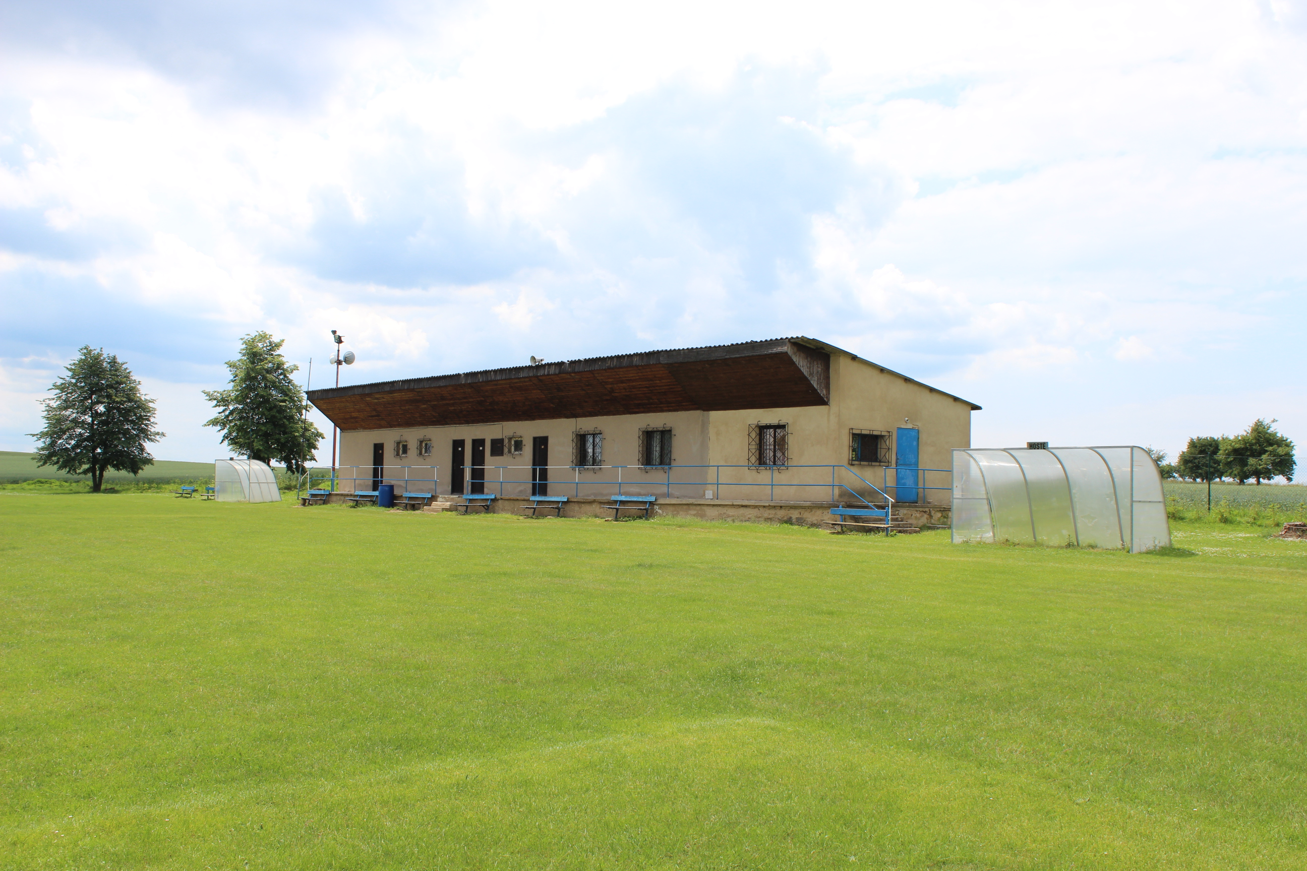 Zázemí fotbalového hřiště v Bratronicích v kladenském okrese.